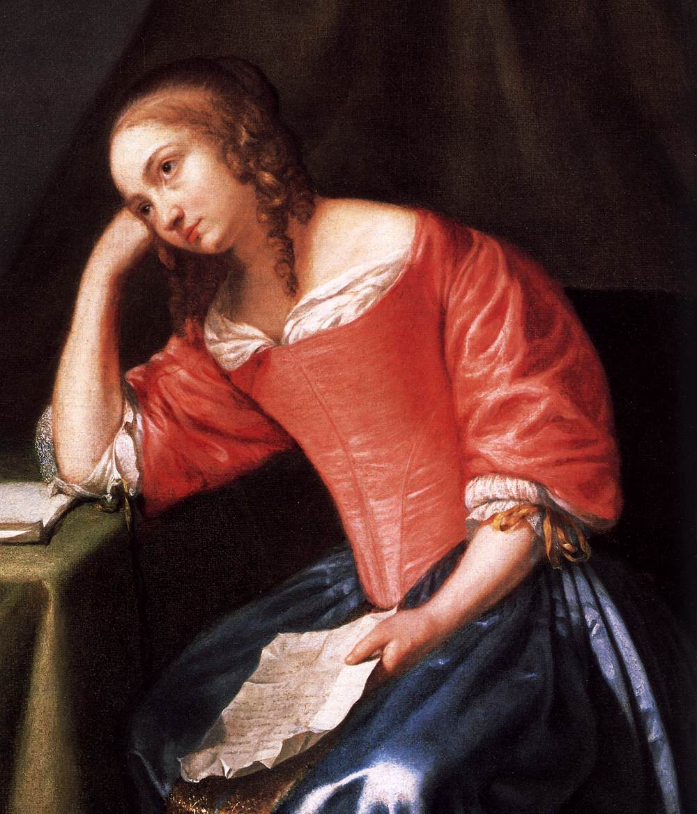 detail